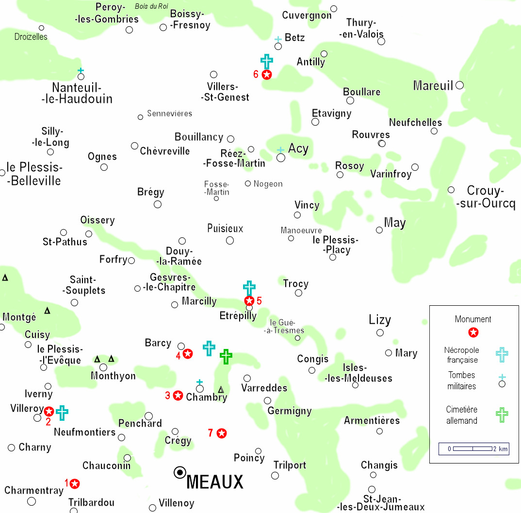 Lieux de mémoire : monuments, nécropoles, cimetières